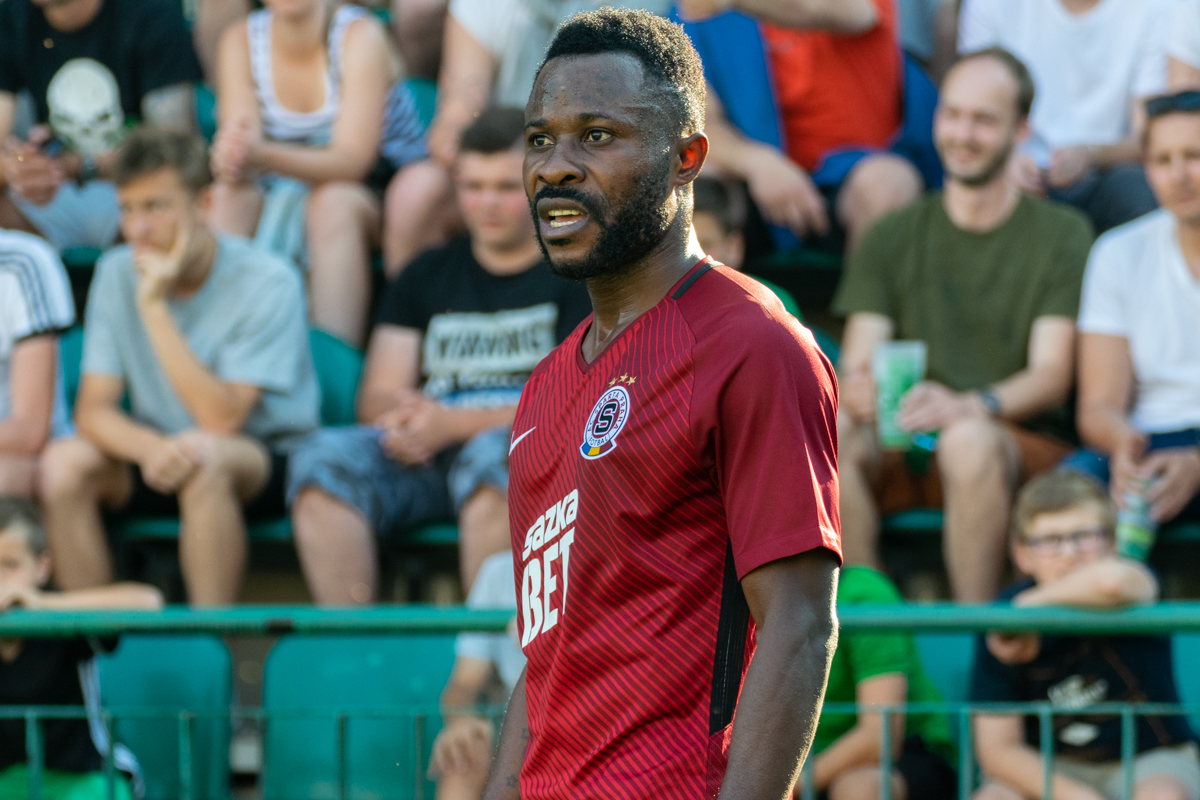 Guélor Kanga vs Bohemians Praha 1905